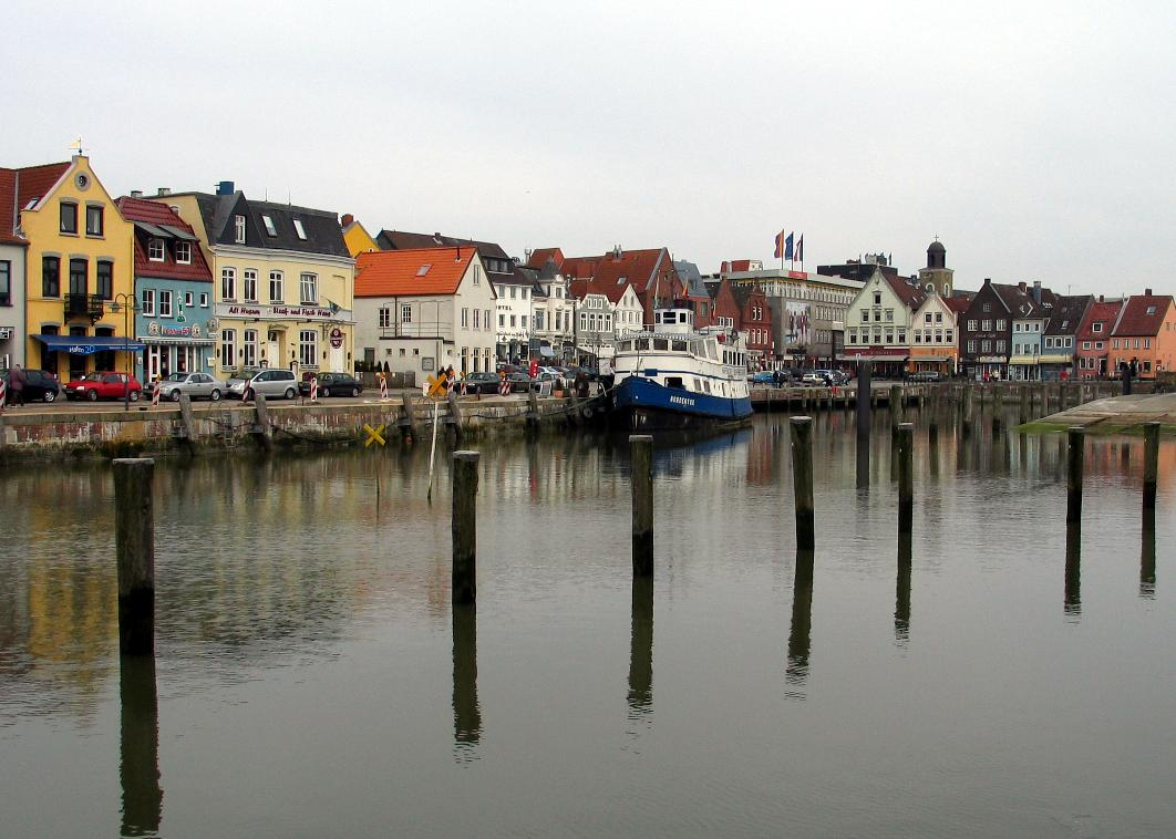 Husumer Hafen